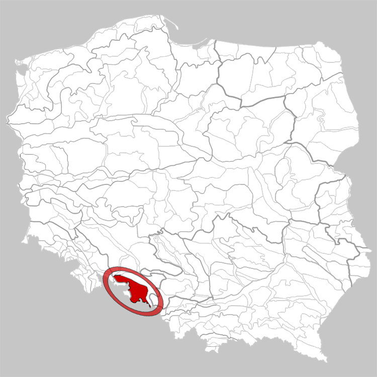 Physico-geographical regionalization of Poland Mezoregion 318.58 Głubczyce Plateau Regionalizacja fizycznogeograficzna Polski Mezoregion 318.58 Płaskowyż Głubczycki